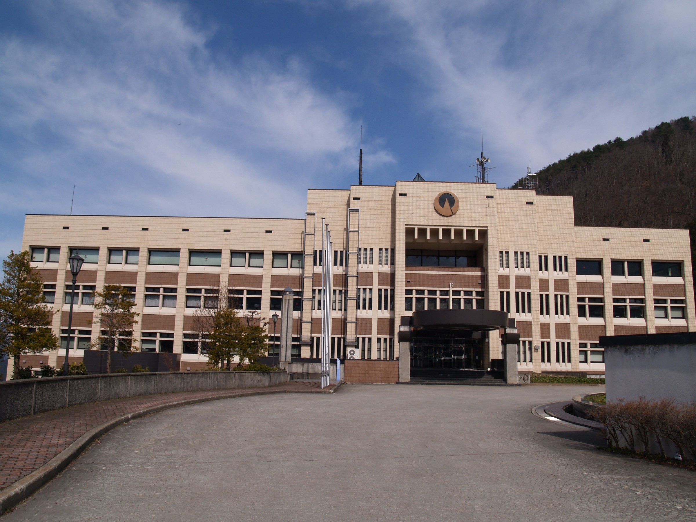 野沢温泉村役場